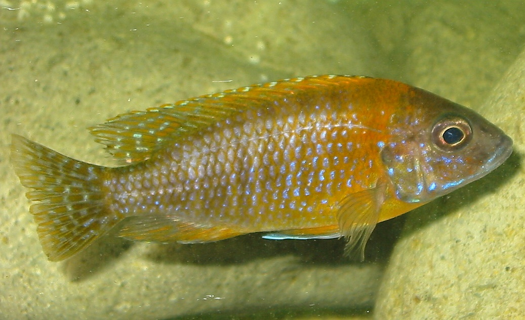 Photographer: User riftreef / [1] Subject: Aulonocara stuartgranti (Syn. Aulonocara stuartgranti) / Eureka